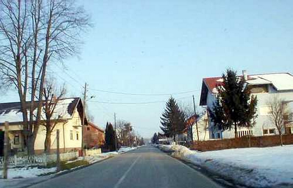 Naselje Stjepana Radića - Main Only Street